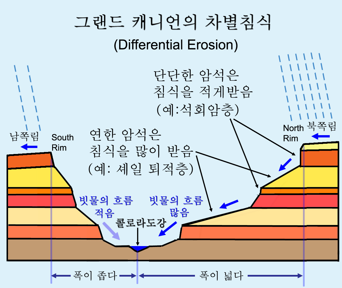 캐니언의 차별침식 설명그림